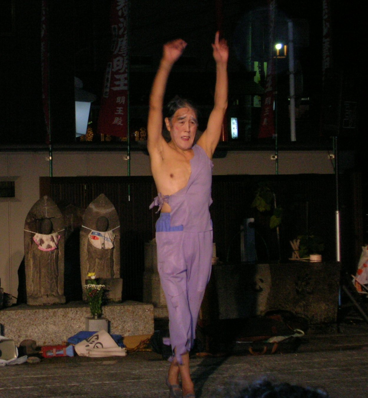 Gilyak Amagasaki, Osu Daidoh Chonin Matsuri, 2006. Loc: Osu, Naka ward, Nagoya city, Aichi Prefecture, Japan ja:「白鳥の湖」を舞うギリヤーク尼ヶ崎。2006年の大須大道町人祭にて撮影。 撮影場所 愛知県名古屋市中区大須